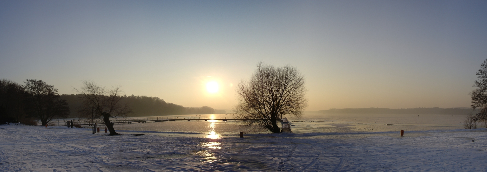 Werbellinsee im Winter am Strand aufgenommen im EJB